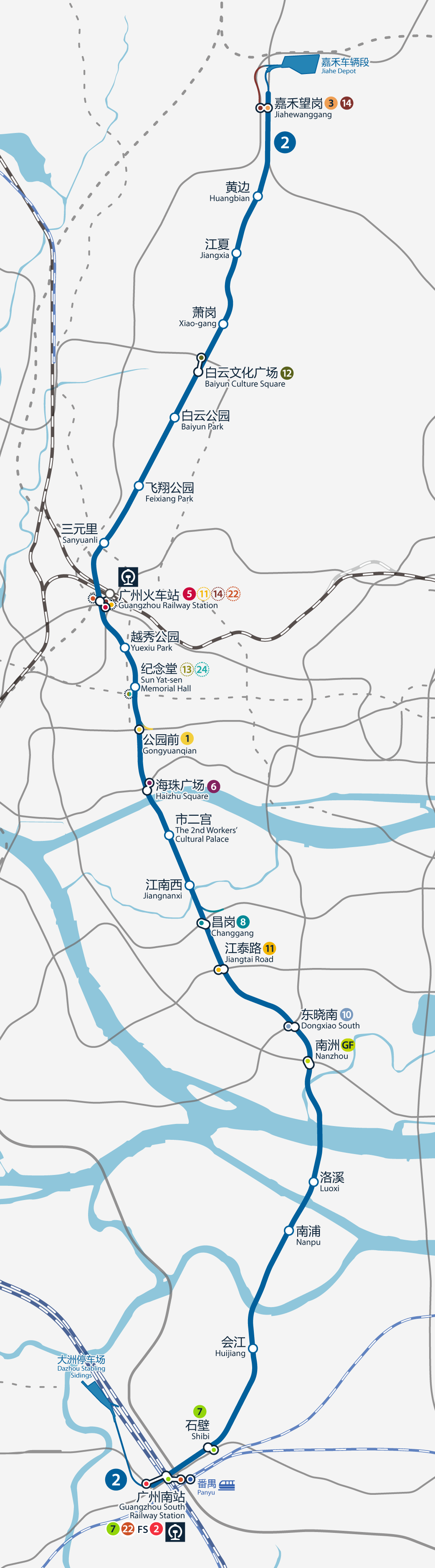 廣州地鐵2號線路線圖，按真實走向比例繪畫